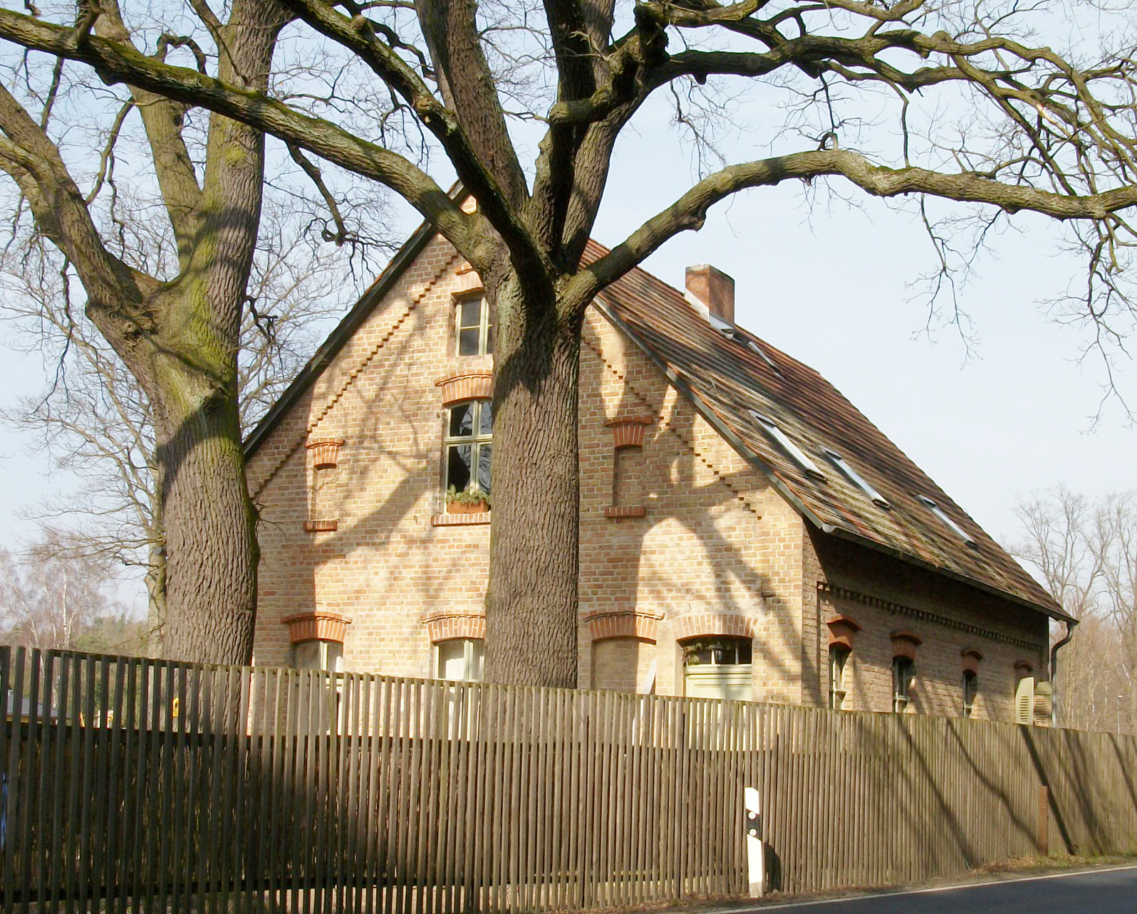 ehemalige Chausseegeld-Hebestelle, Denkmalschutz